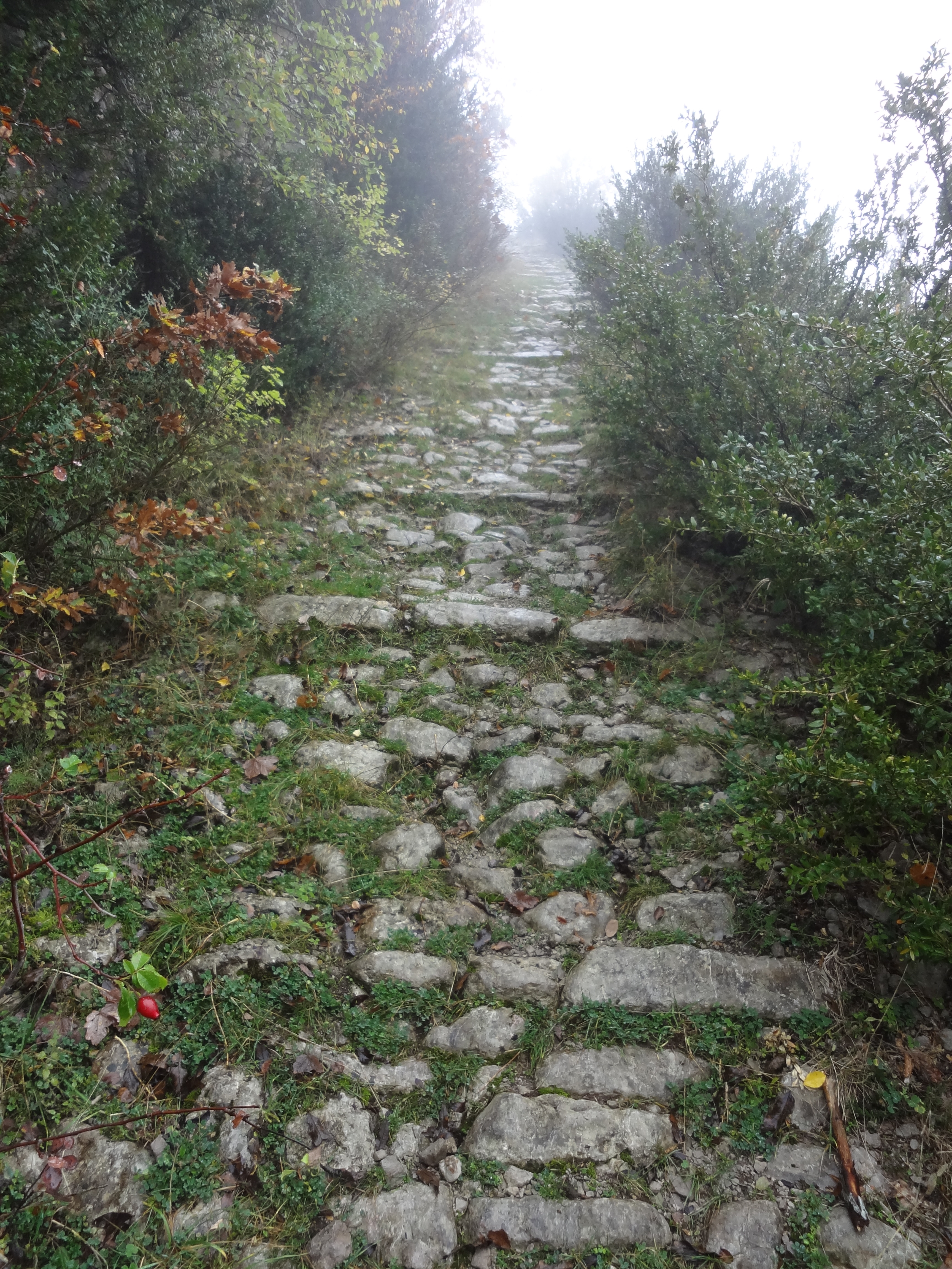 Calade montant au Pas des Portes, versant nord